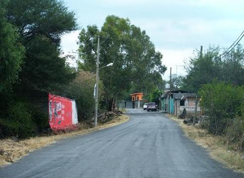 Entrada a La Deseada de Arriba en Uriangato